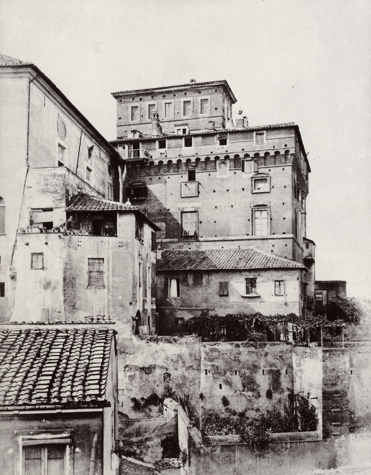 Parker, John Henry: Die Torre di Paolo III. am Kapitol